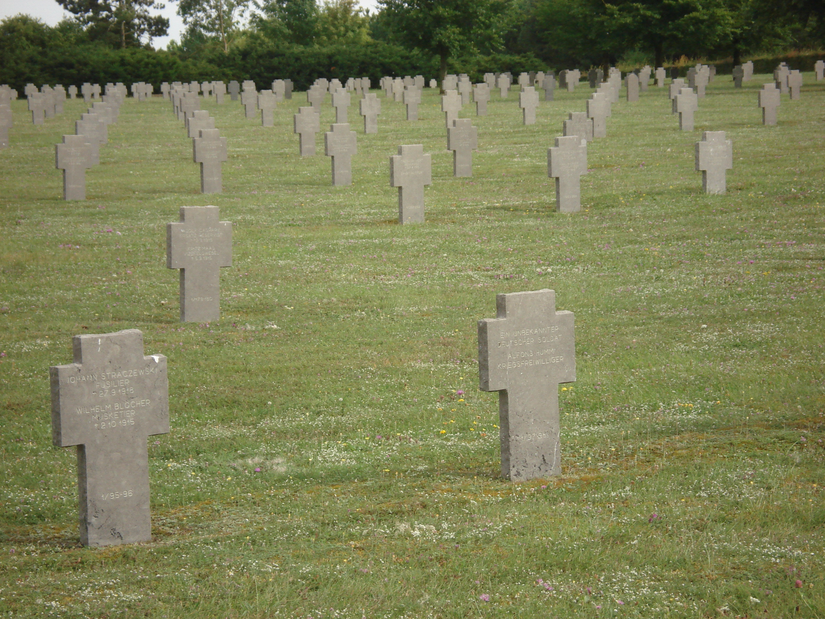 Deutscher Soldatenfriedhof in der Champagne